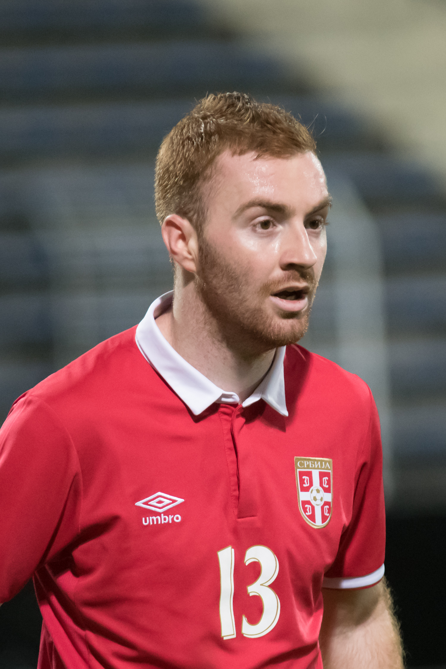 U21 Europameisterschaftsqualifikationsspiel Österreich gegen Serbien am 11.10.2017 in der BSFZ-Arena Maria Enzersdorf. Bild zeigt: Miroslav Bogosavac